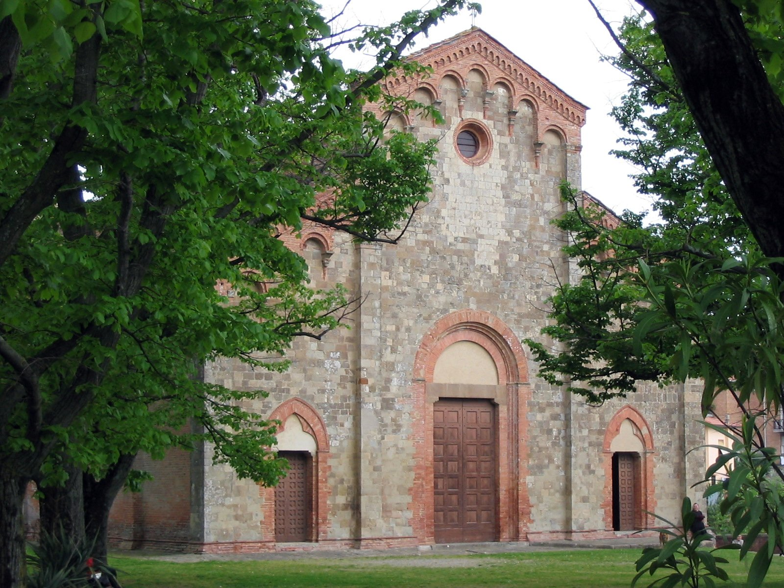 Facciata della Pieve di San Martino, Palaia